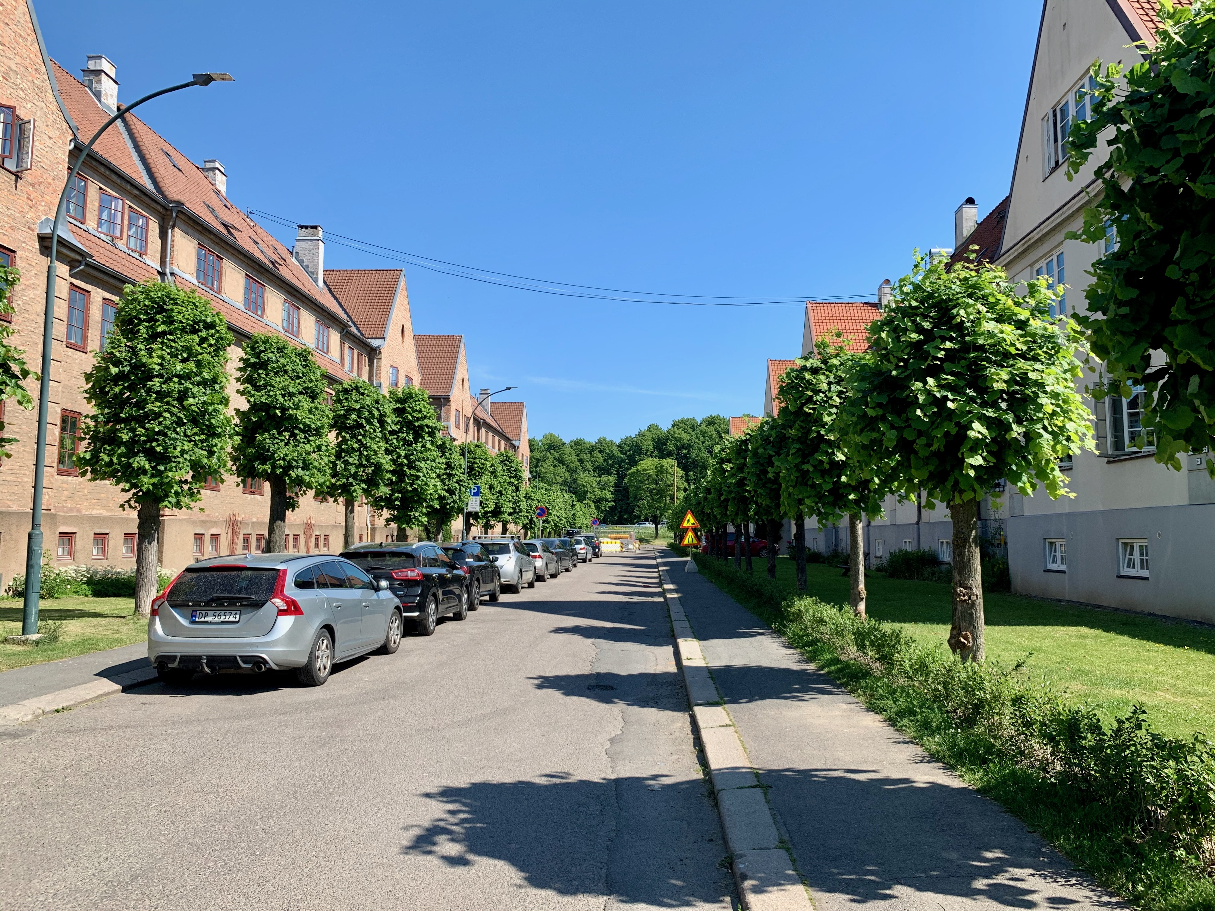 Fayes gate i Oslo